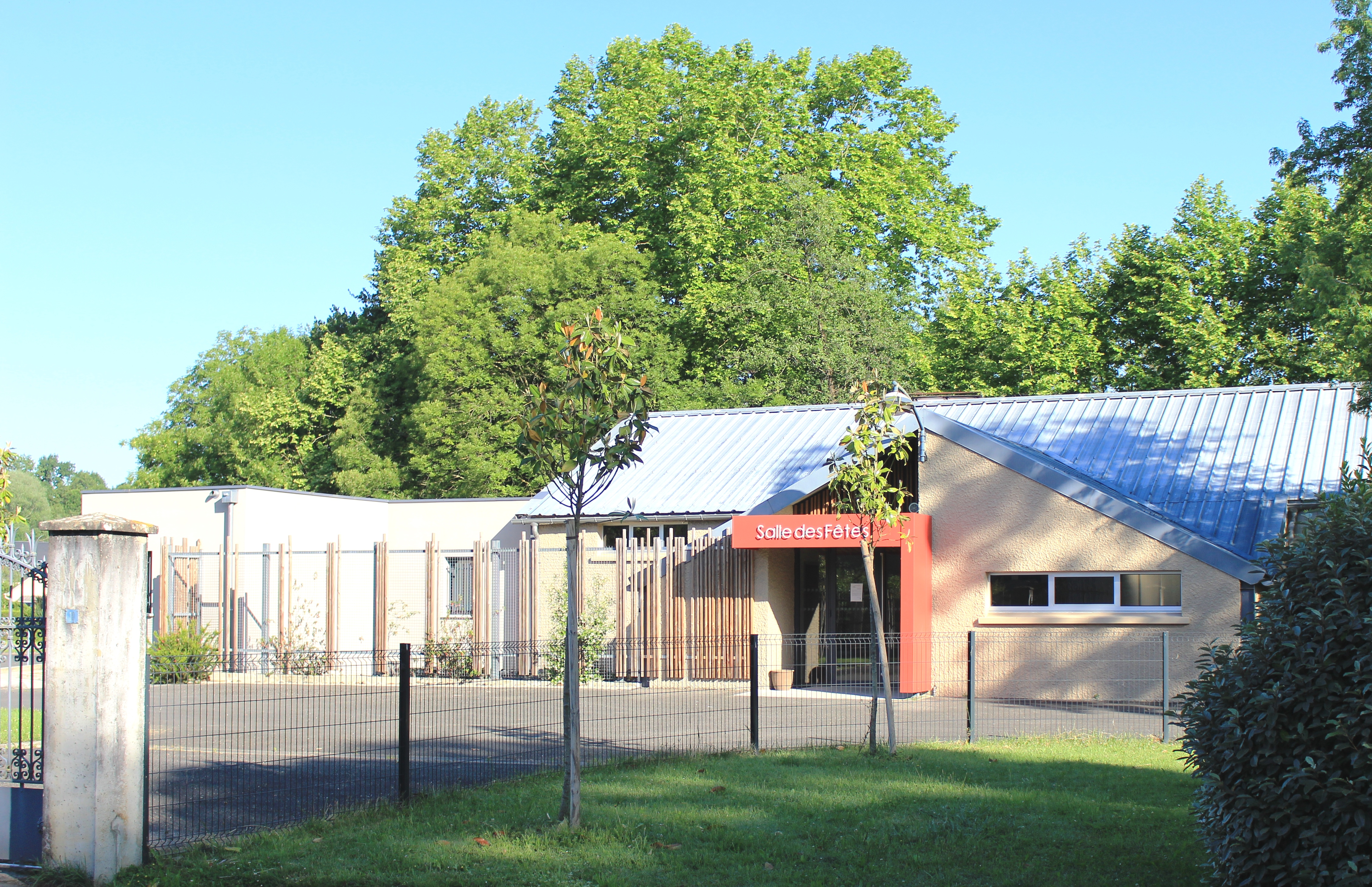 Salle des fêtes de Saint-Martin (Hautes-Pyrénées)